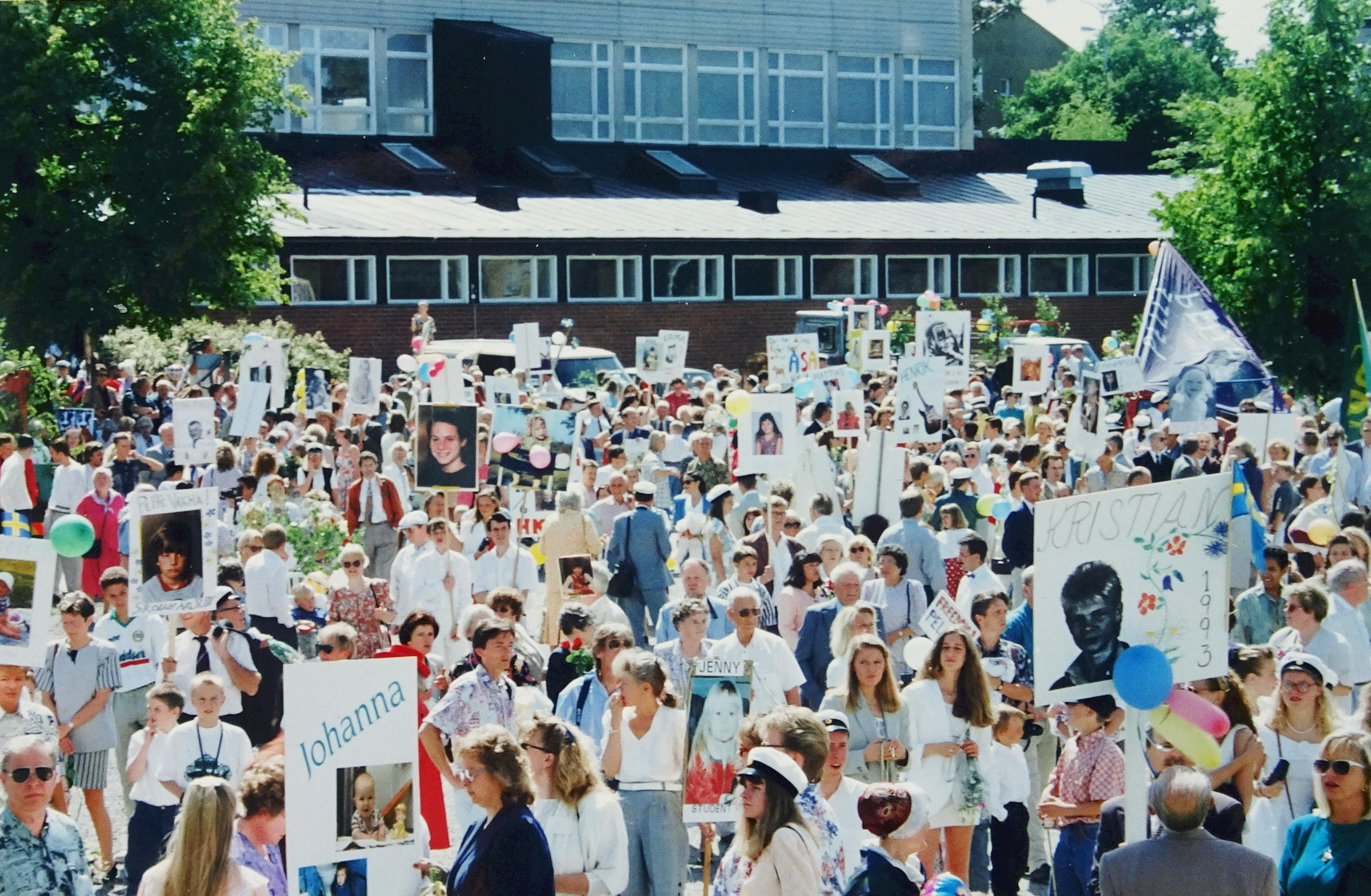 Utspring på Kärrtorps gymnasium 10 juni 1993